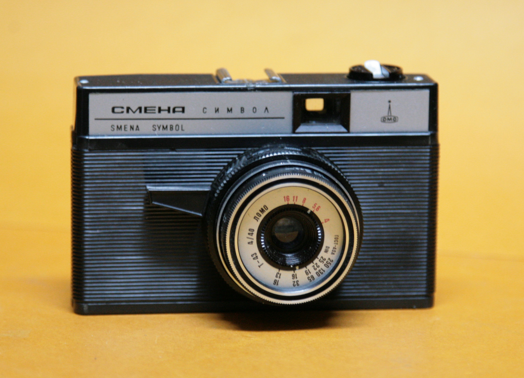 Coll. Marcè CL - LOMO Smena SYMBOL 1971-1991